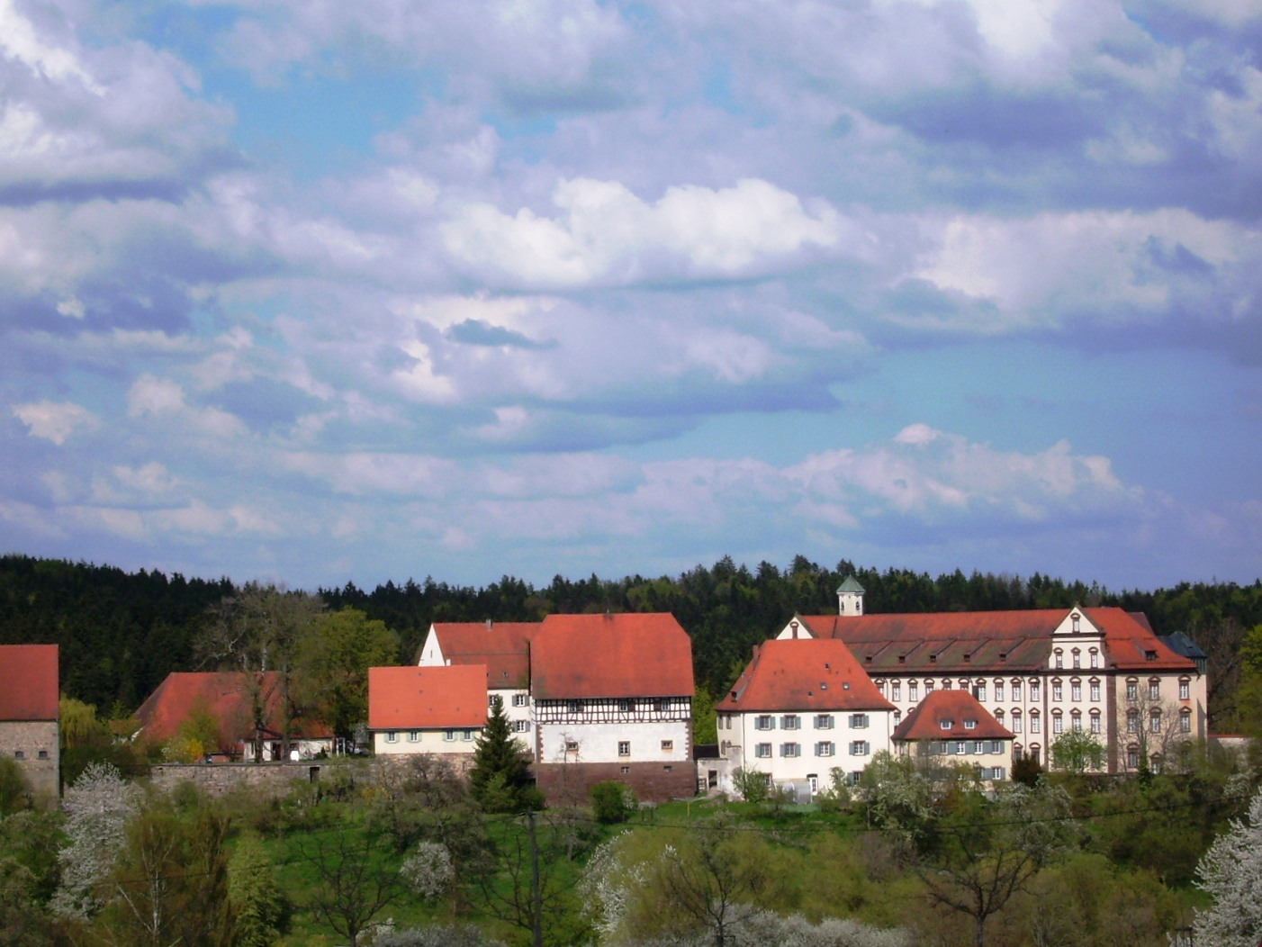 Kloster Kirchberg, Baden-Württemberg, Deutschland.